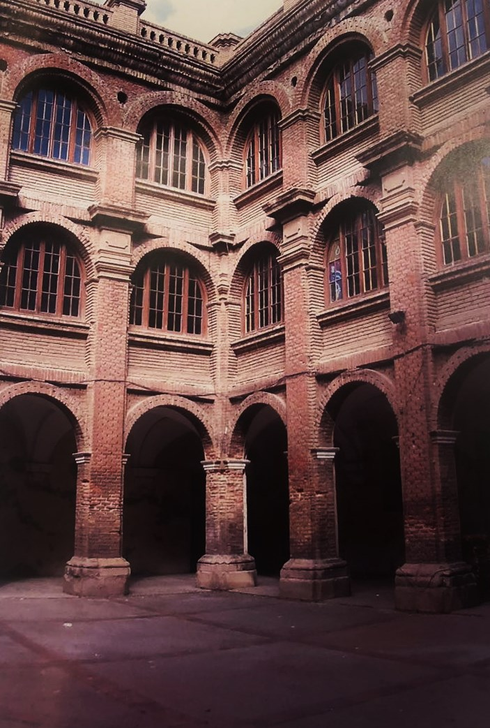 Antic Claustre, actualment ha estat reformat encara que segueix sent molt similar.